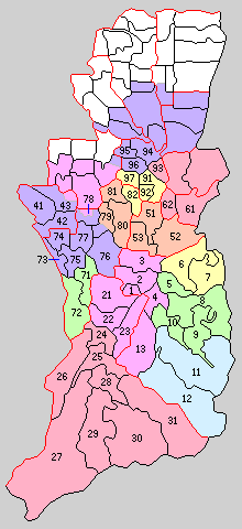 後の大阪府南河内郡域の町村制時点の町村。